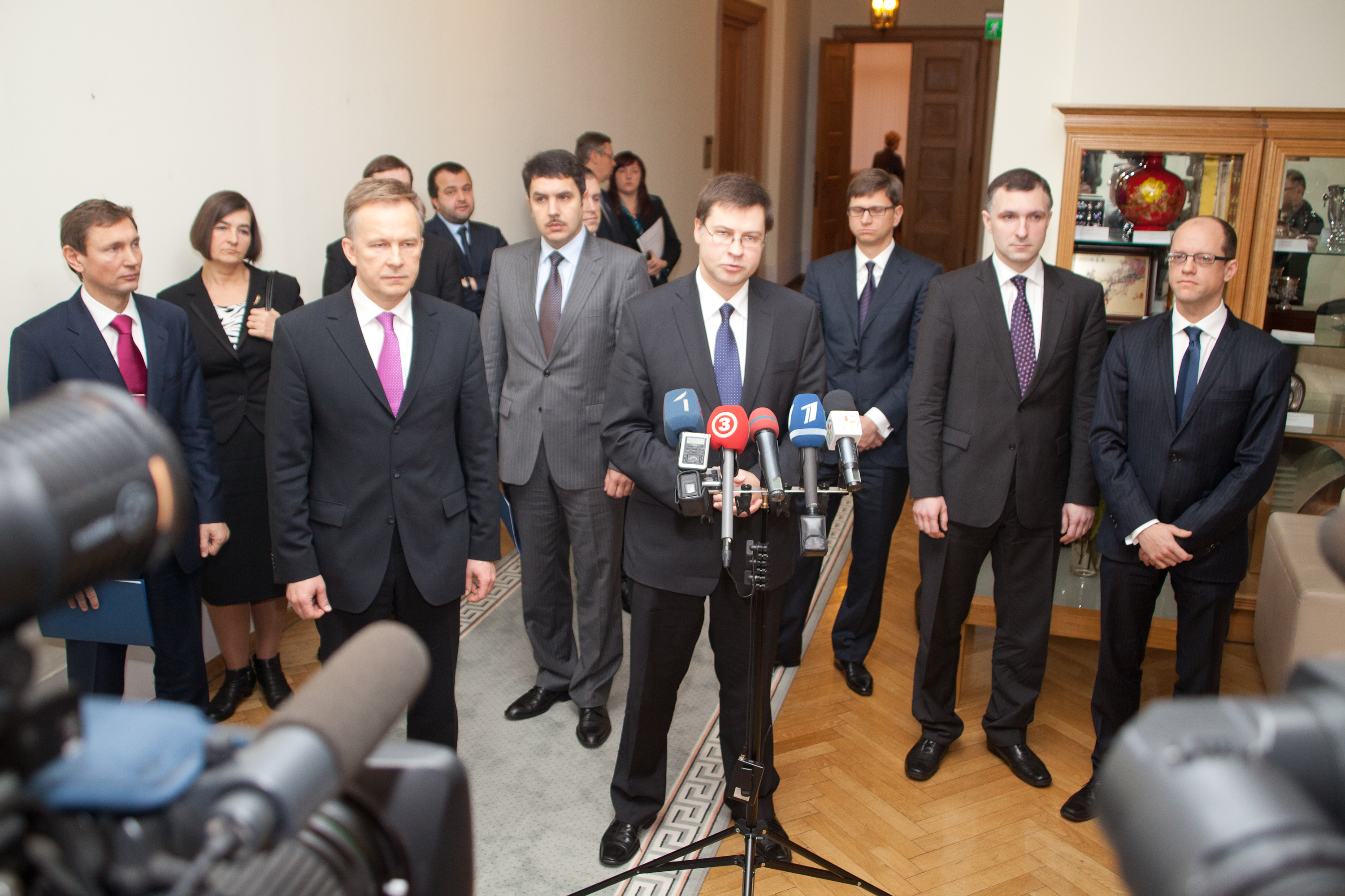 Foto: Toms Norde, Valsts kanceleja